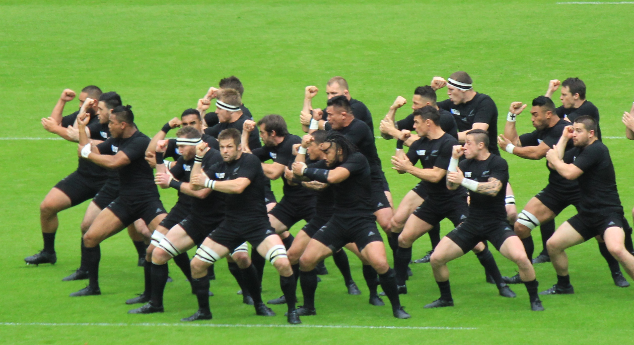 Hakka